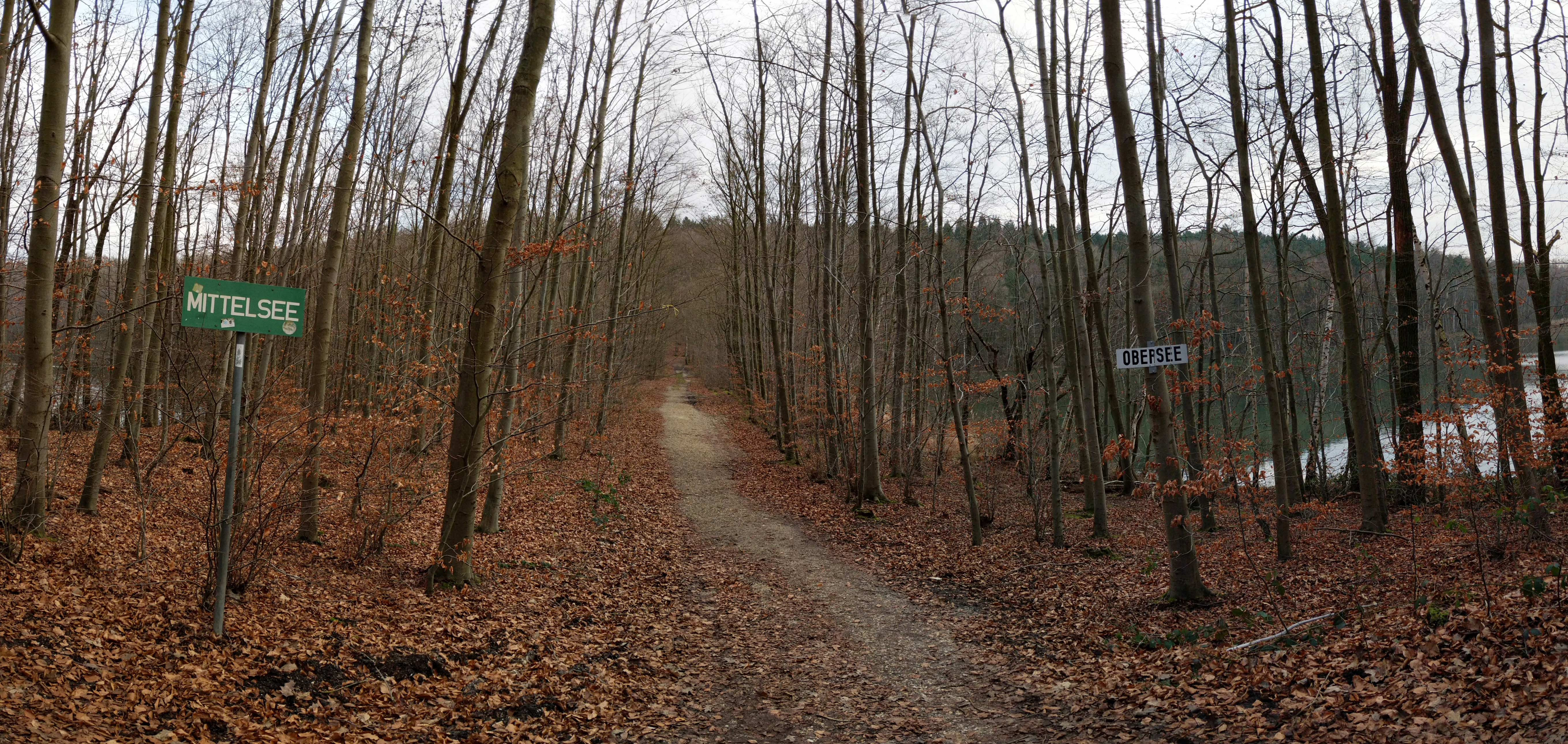 An den Heider Bergsee schließen sich im Westen die dreiteiligen Ville-Seen an, zwischen denen man durchgehen kann. Hier der Weg zwischen Obersee und Mittelsee.